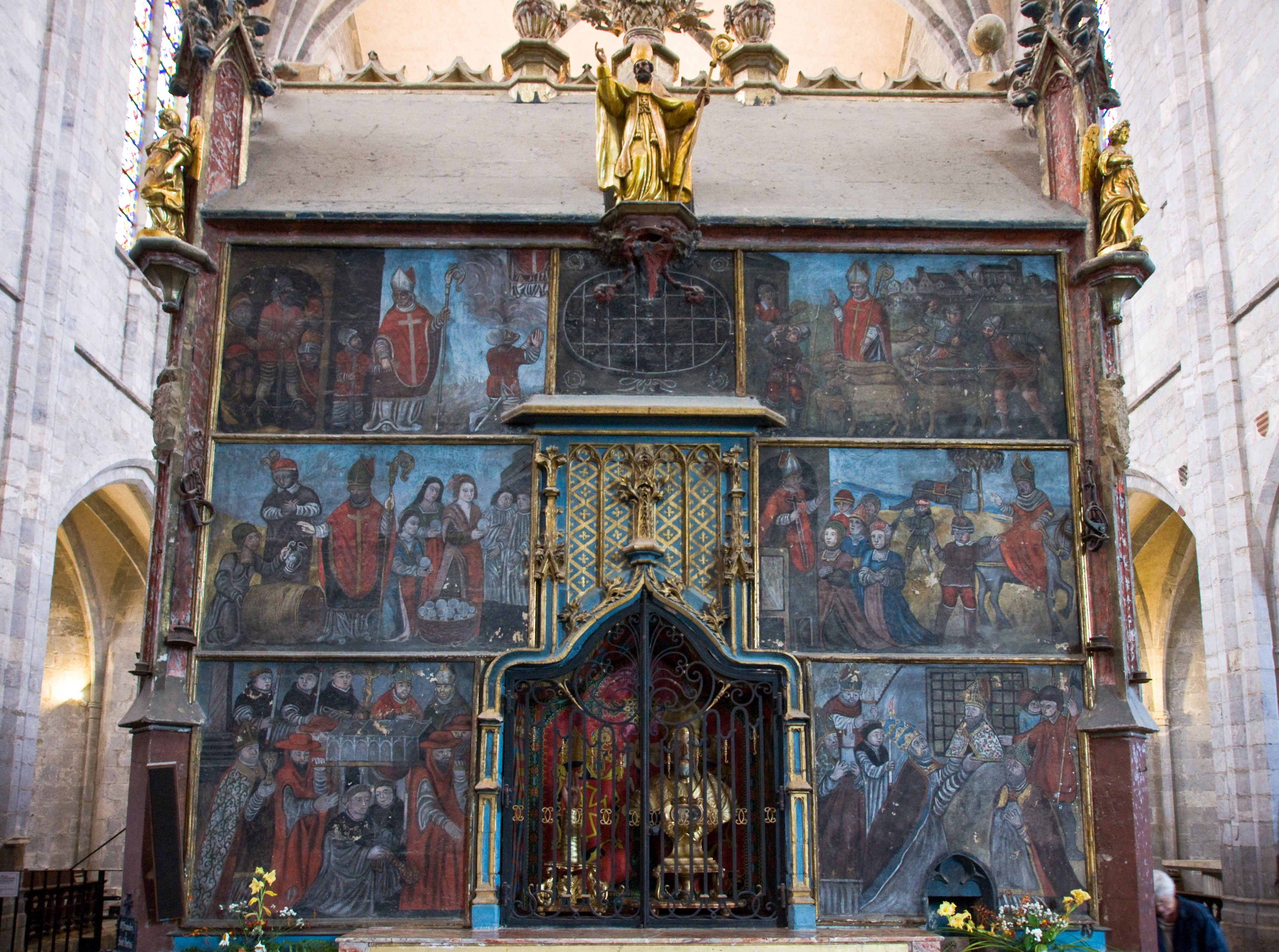 Tombeau de Saint Bertrand dans la cathédrale Notre-Dame de Saint-Bertrand de Comminges